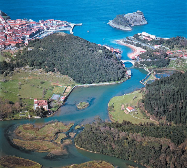 Lekeitioko ikuspegia